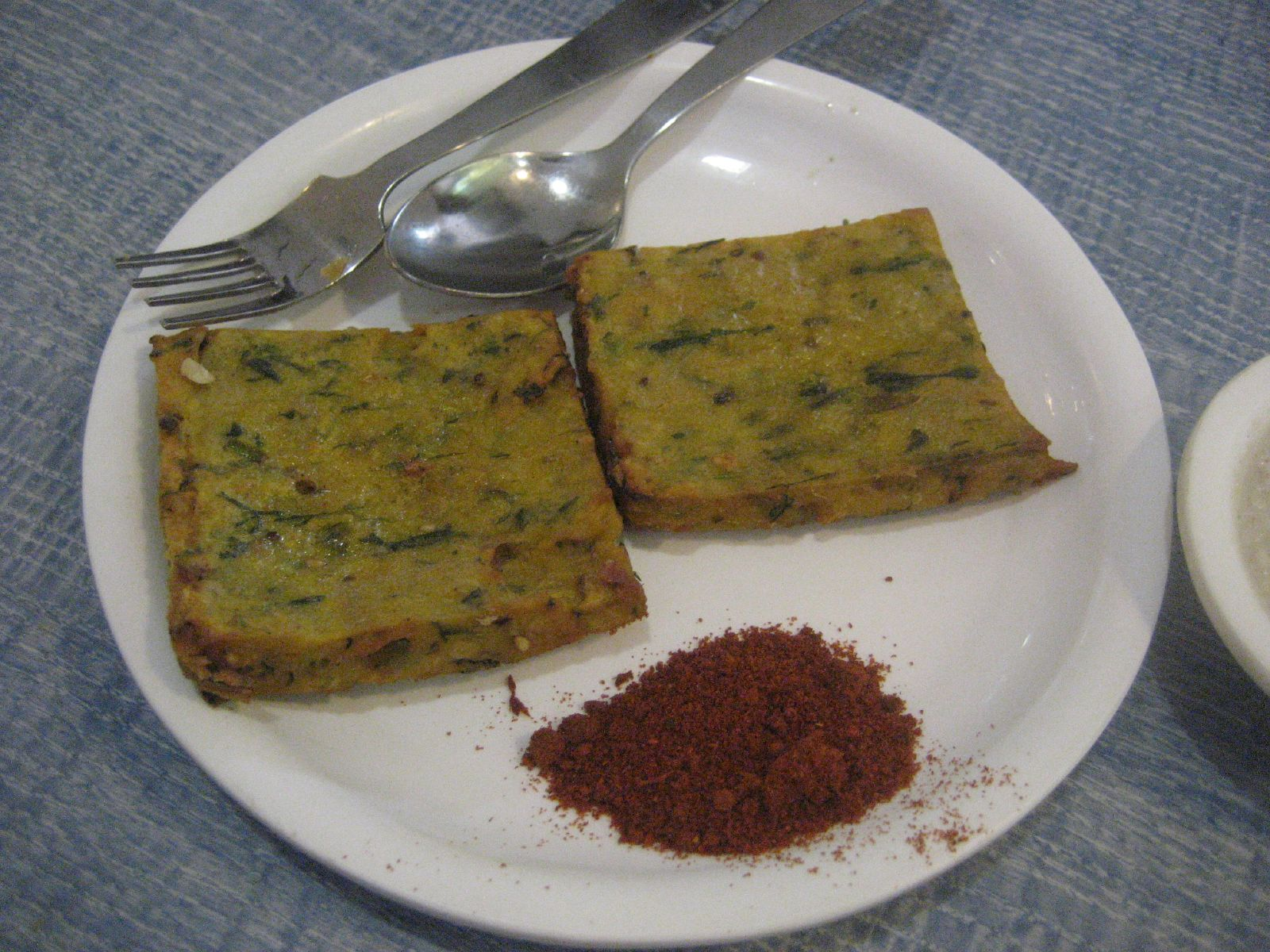 Kothimbir Wadi